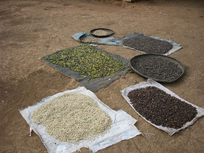 Self made picture.